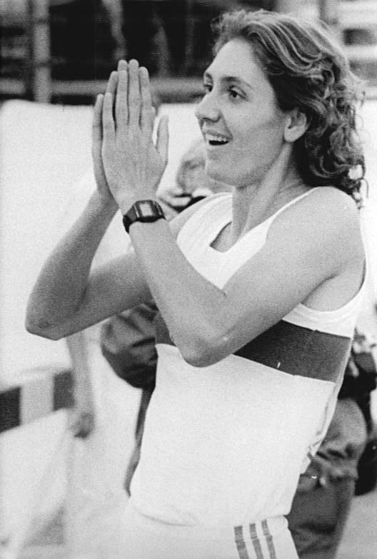 Petra Müller ADN-ZB Kluge 4.6.88 Jena: Leichtathletik-Olympiaqualifikation- Vizeweltmeisterin Petra Müller (SC Chemie Halle) gewann die 400 m in der Jahresweltbestzeit von 49,30 sec.